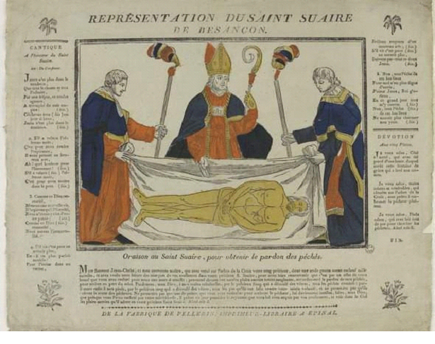 Représentation du Saint Suaire de Besançon par la fabrique de Pellerin, imprimeur-libraire à Epinal. L'estampe en couleur sur papier du début du XIXe siècle figure l'ostension du suaire par un archevêque et deux chanoines.